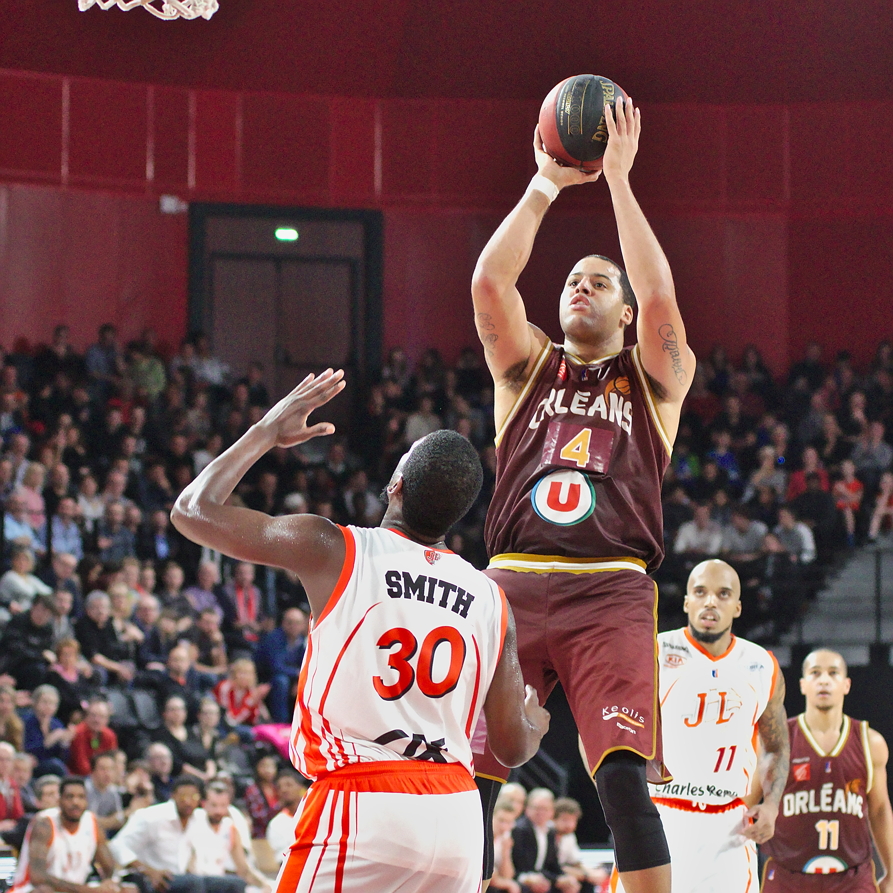 JLB-OLB - 20150124